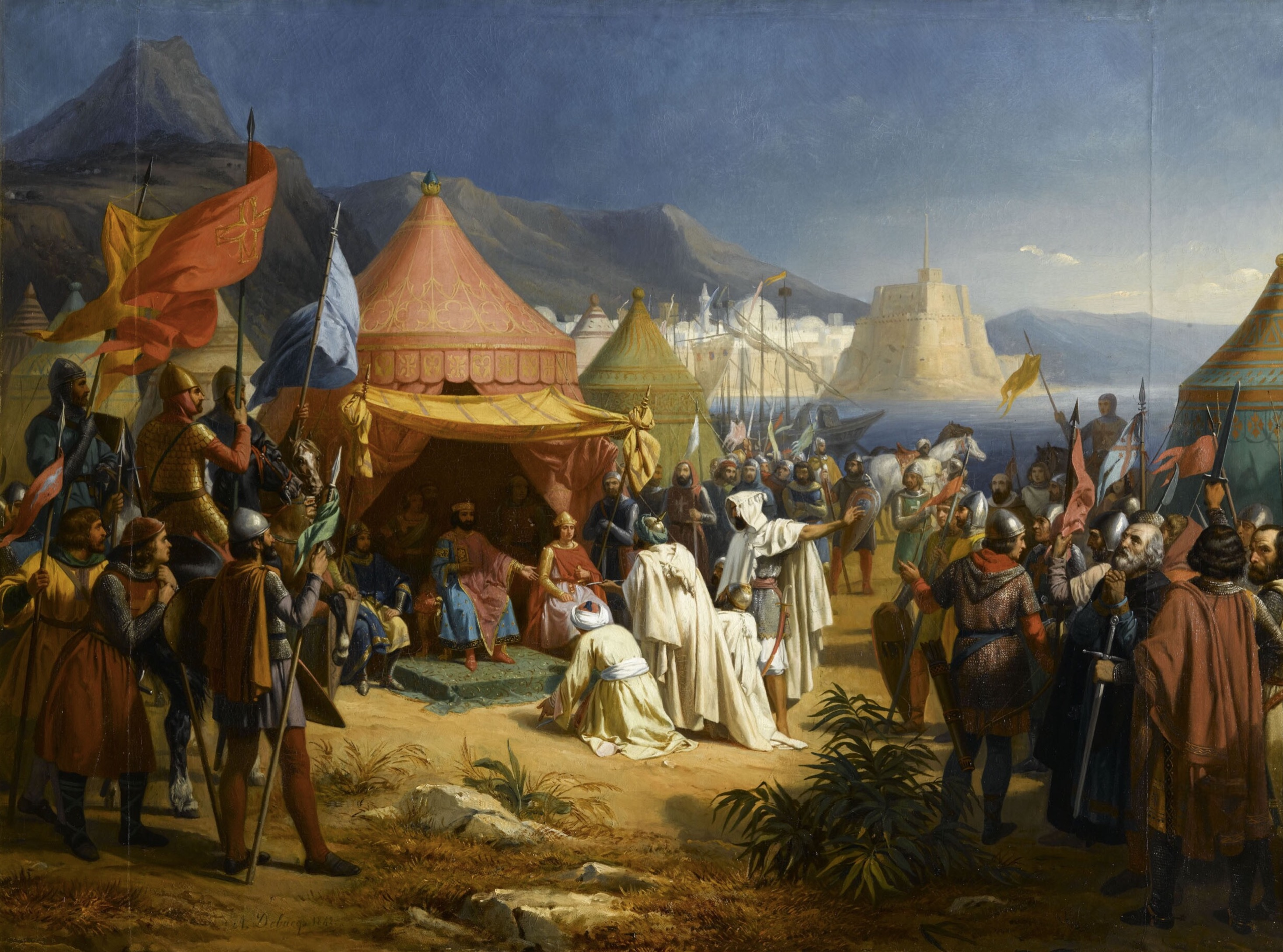 Tableau commandé par Louis-Philippe pour le musée historique de Versailles en 1838, exécuté en 1842 par Debacq